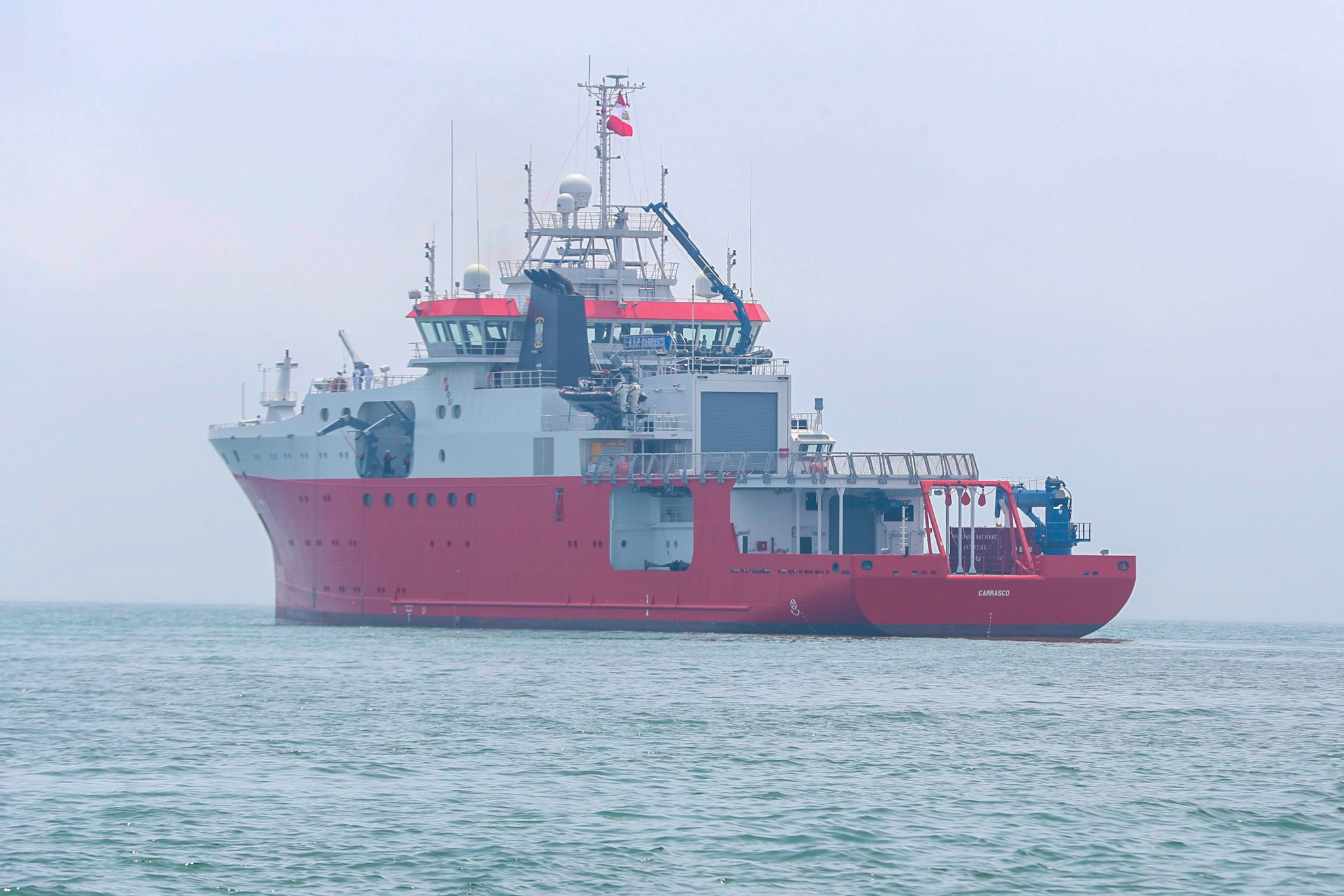 BAP Carrasco en mar del Callao (2018)